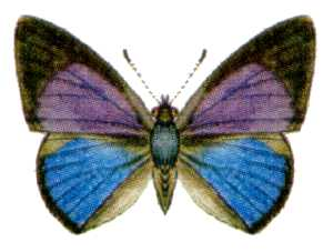 Philiris fulgens kurandae